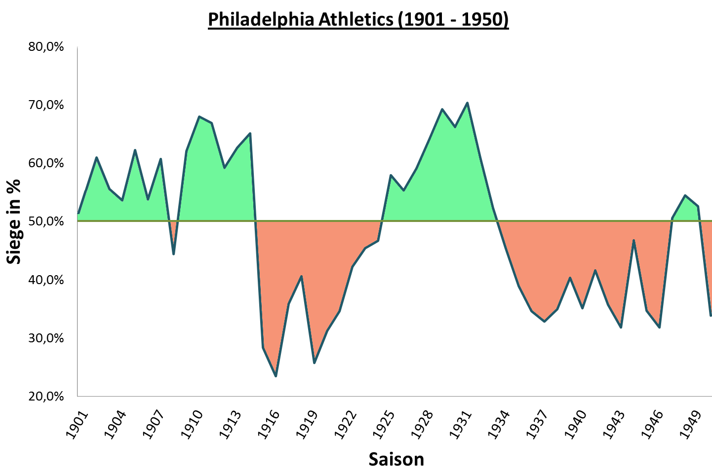 Grafische Darstellung der Siegquote der Philadelphia Athletics unter Manager Connie Mack